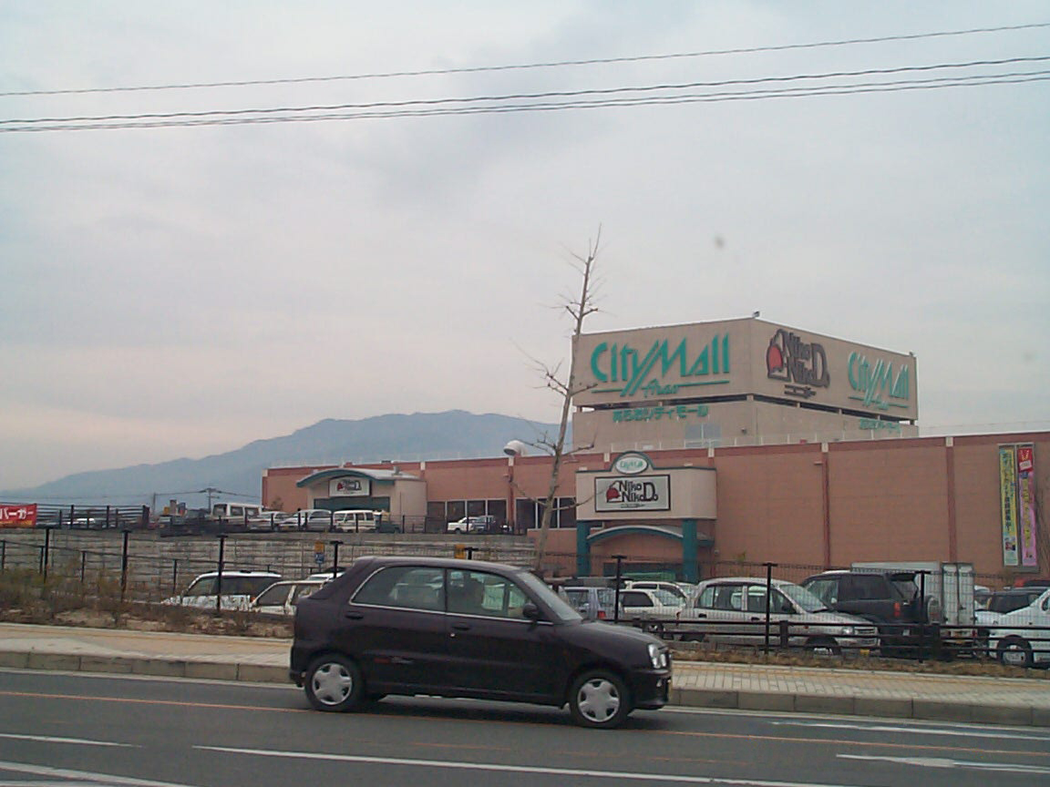 シティーモールあらおの核テナントがゆめタウンになる前のものです